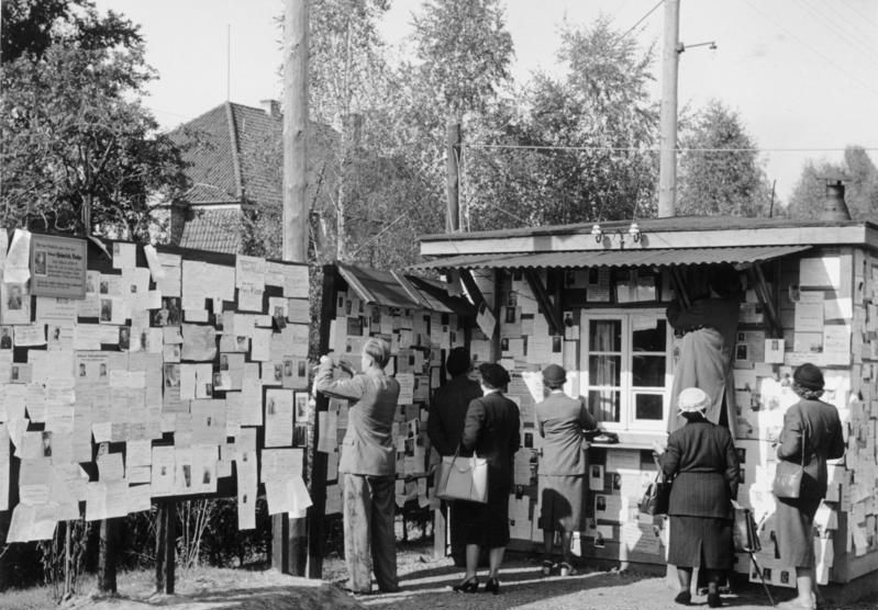 Rotes Kreuz - Suchdienst im Lager Friedland